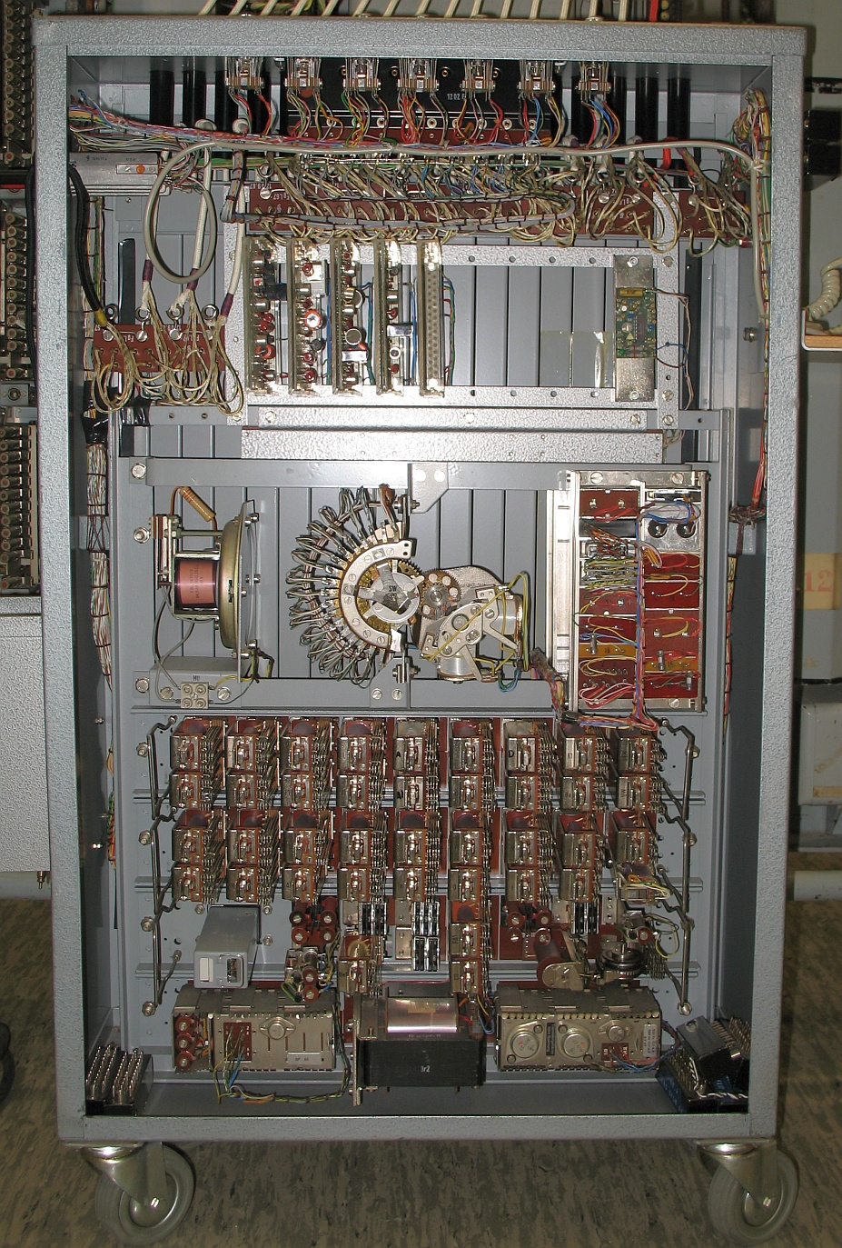 Gerät für sog. Fangschaltung zur Identifizierung eines Anrufers; Fernmeldemuseum Aachen